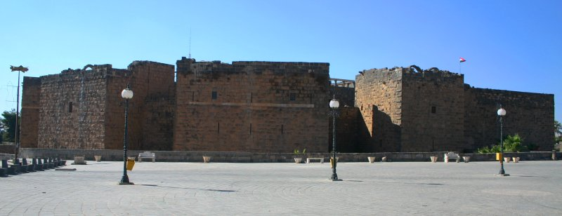 Zitadelle von Bosra, eigenes Bild von 2006 public domain Mewes